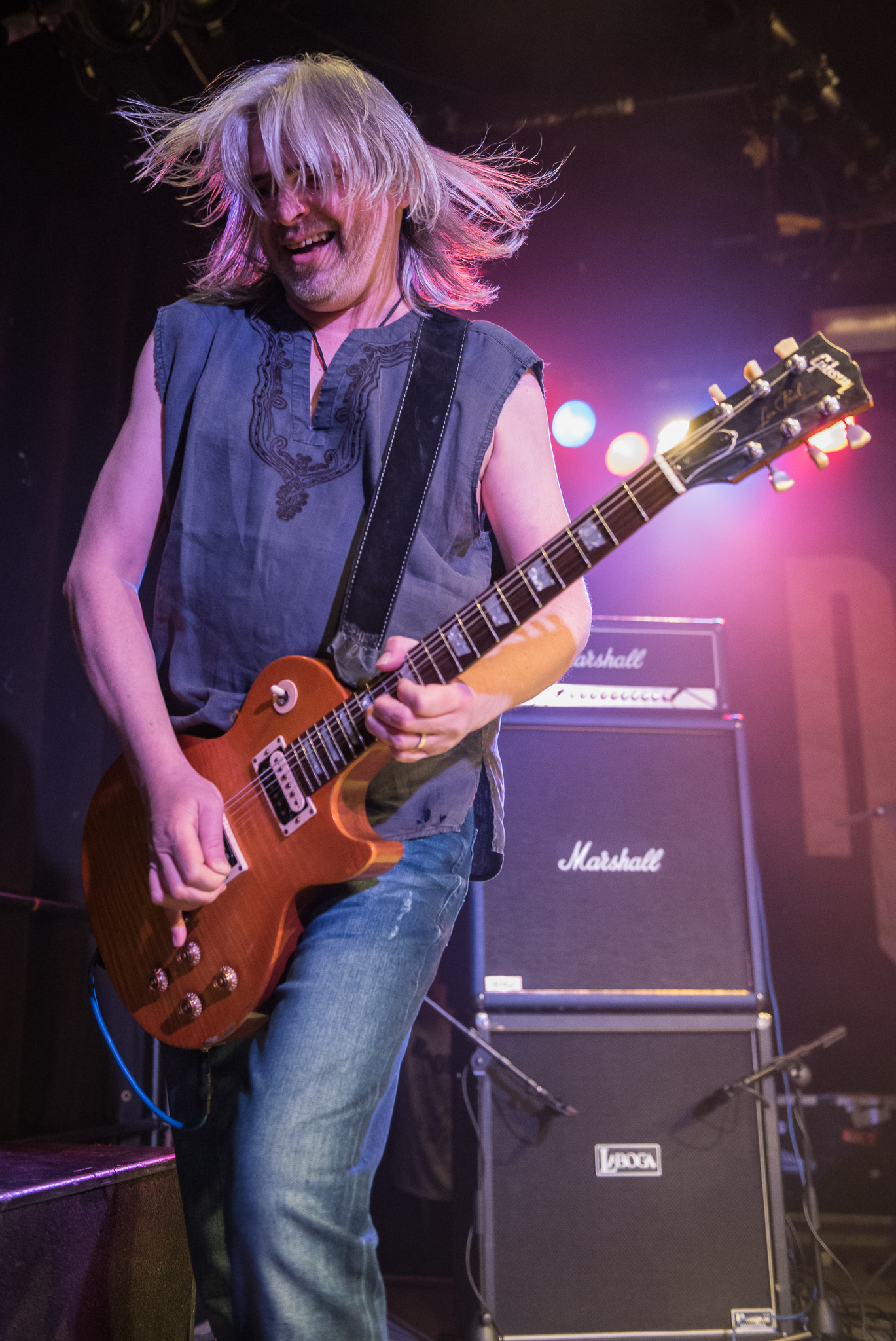 Concertbüro Franken,Der Hirsch,Jimmy Murrison,Konzert,Livekonzert,Livemusik,Musik,Nazareth